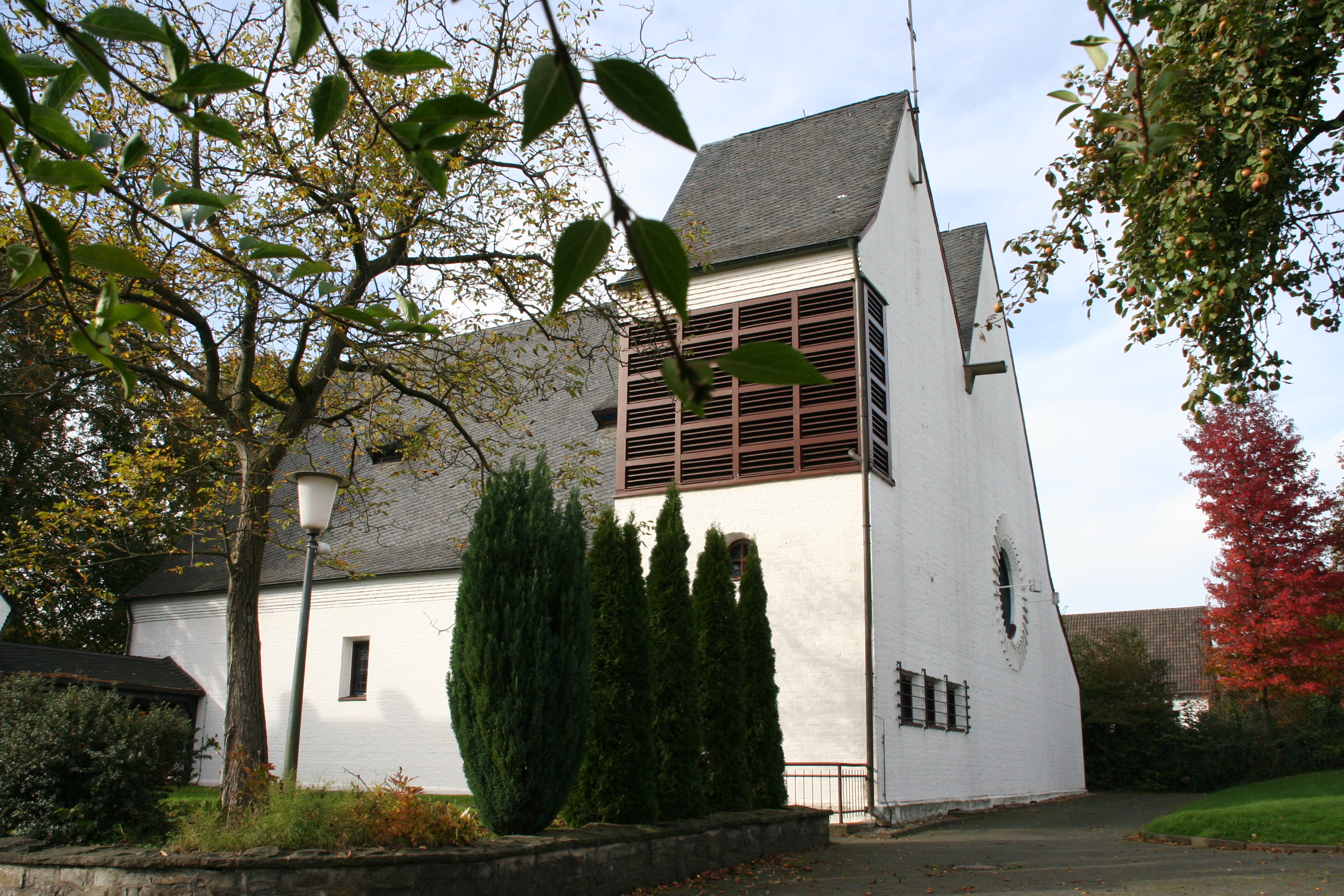 Pfarrkirche St. Engelbert Leverkusen Pattscheid